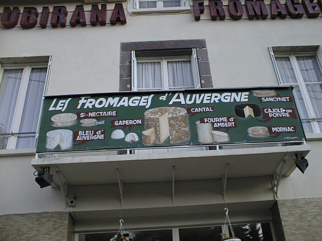 Façade de la fromagerie Subirana : fromages cantal, saint-nectaire et petit-saint-nectaire, bleu d'Auvergne, fourme d'Ambert, gaperon, sancynet, cajole au poivre, mornac.